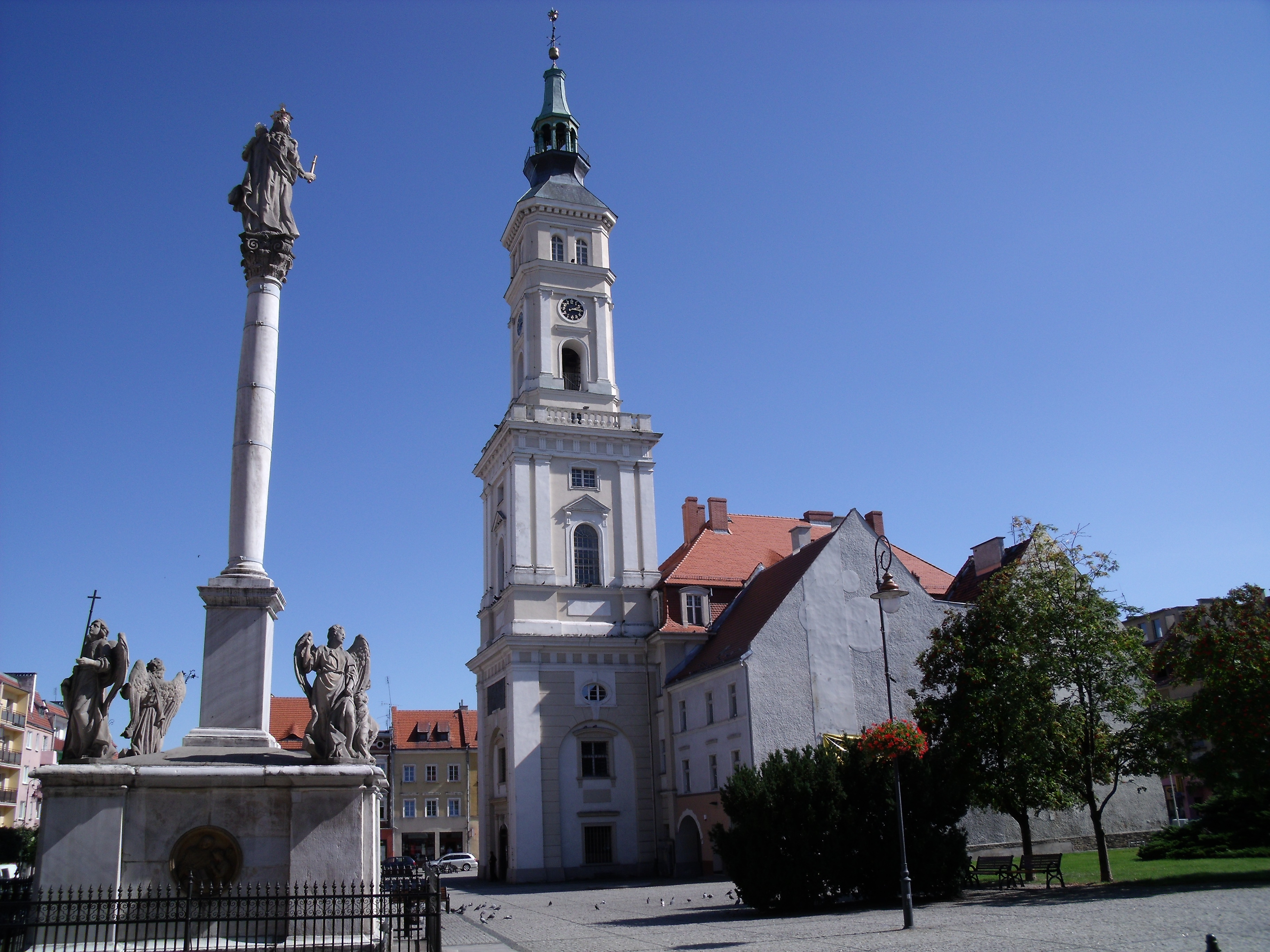 Prudnik, ratusz (XVIII w., 1840) 10.1958. Pierwotnie miała polski napis, został zlikwidowany za Fryderyka II na jego koszt